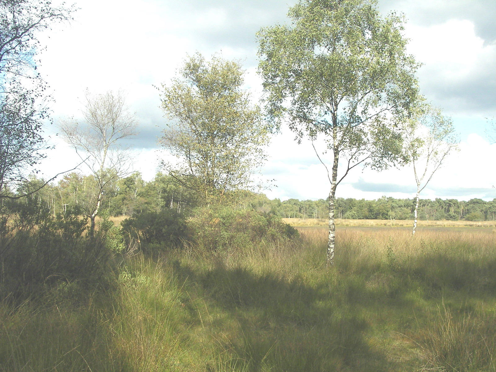 Rand van de Klotterpeel, een vennetje in het in het Beestenveld bij de Rips.